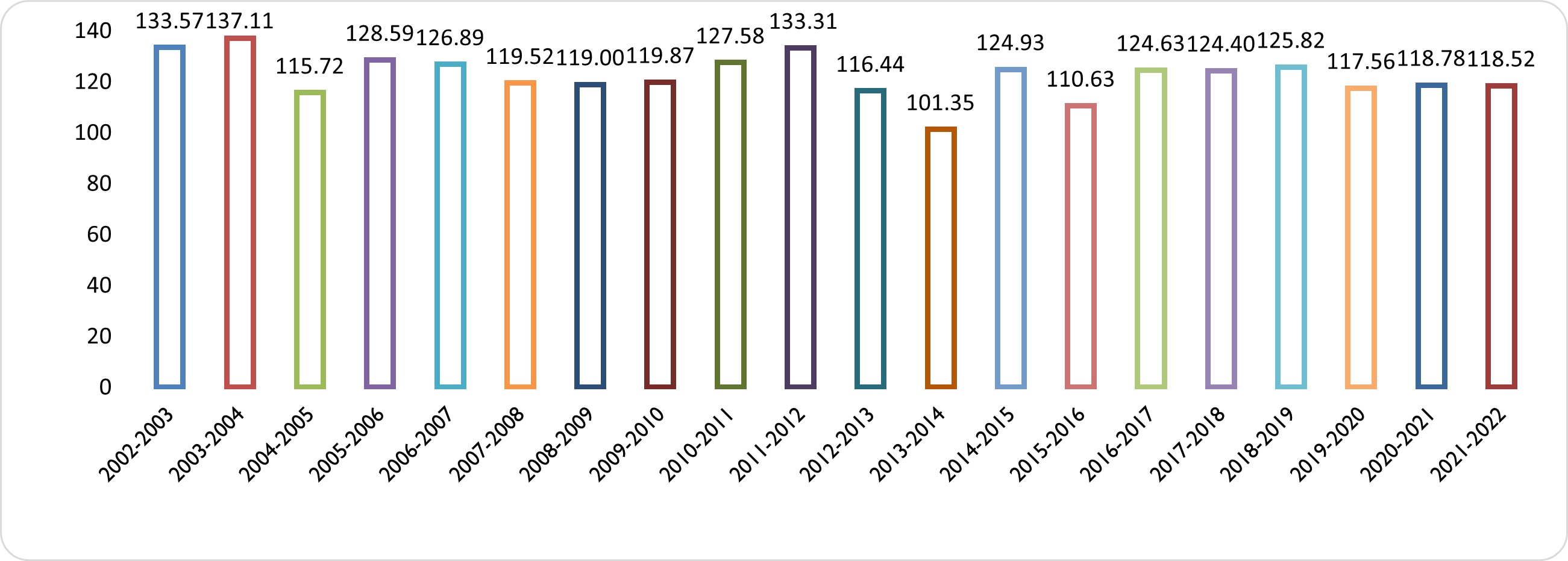 Oʻzbekcha/ўзбекча: Oʻzbek gimnaziyasi bitiruvchilarining umumrespublika testida olgan ballarining oʻrta arifmetigi